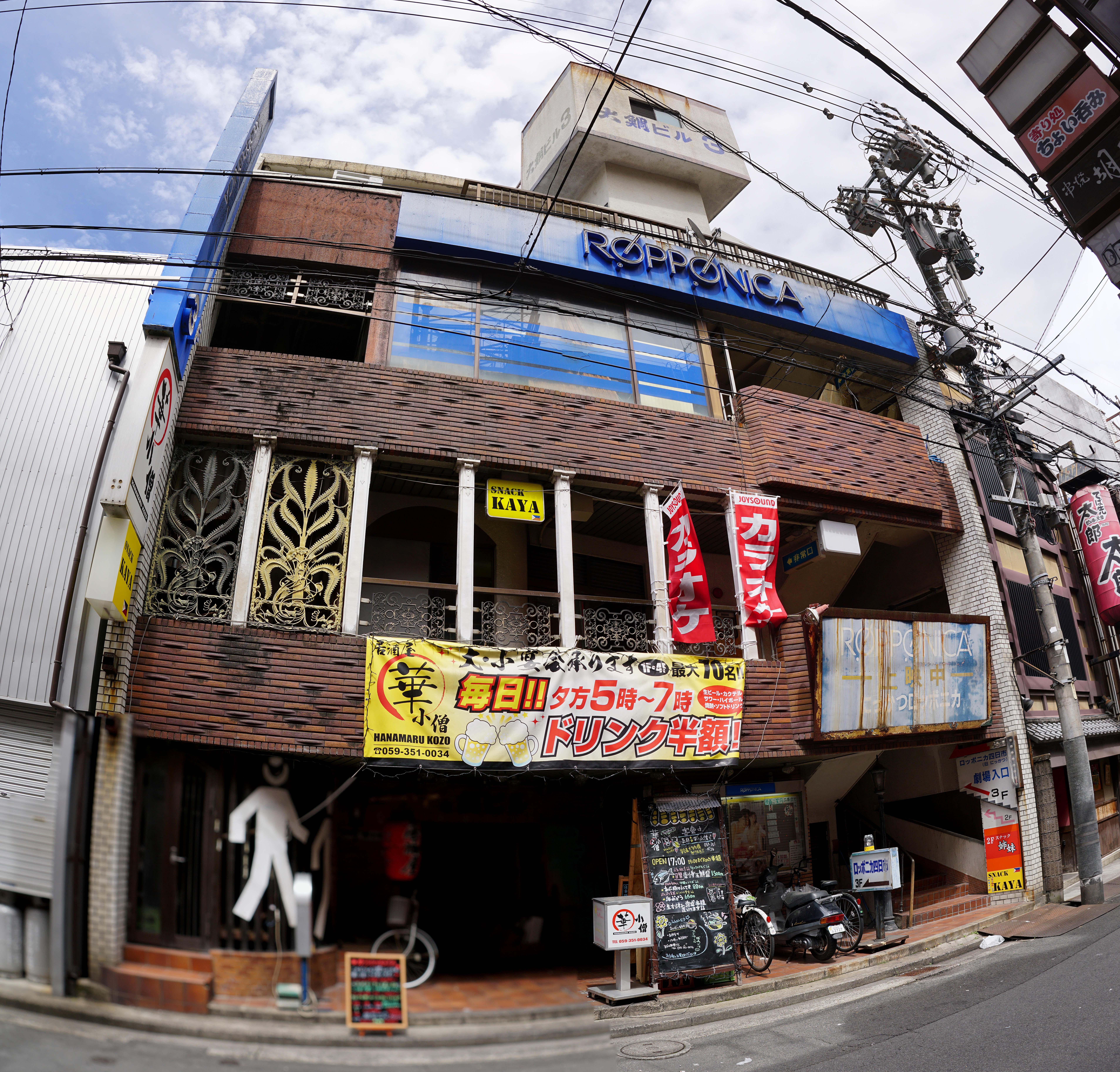 三重県四日市市のロッポニカ四日市。日活系成人映画館。